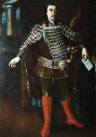 Le Gouverneur de la Transylvanie vers 1750, par le peintre János Haller.